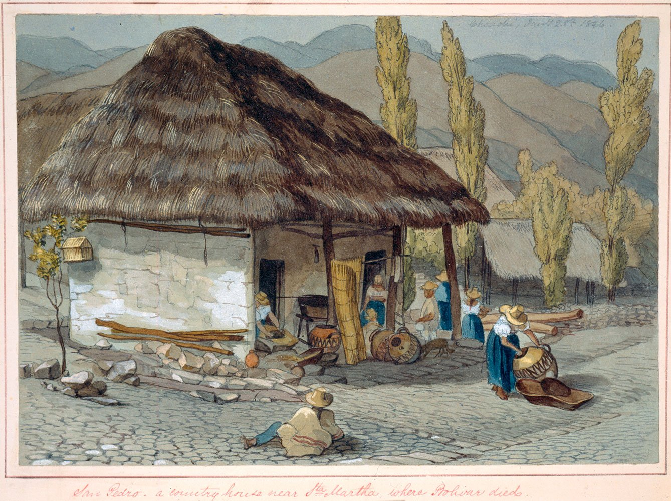 TÍTULO El rancho campesino, Choachí ARTISTA Edward Walhouse Mark NÚMERO DE REGISTRO AP0118 FECHA DE INGRESO A LA COLECCIÓN Miércoles, Diciembre 18, 1957 TÉCNICA Acuarela sobre papel DENOMINACIÓN Acuarela DIMENSIONES 17,3 x 25 cm